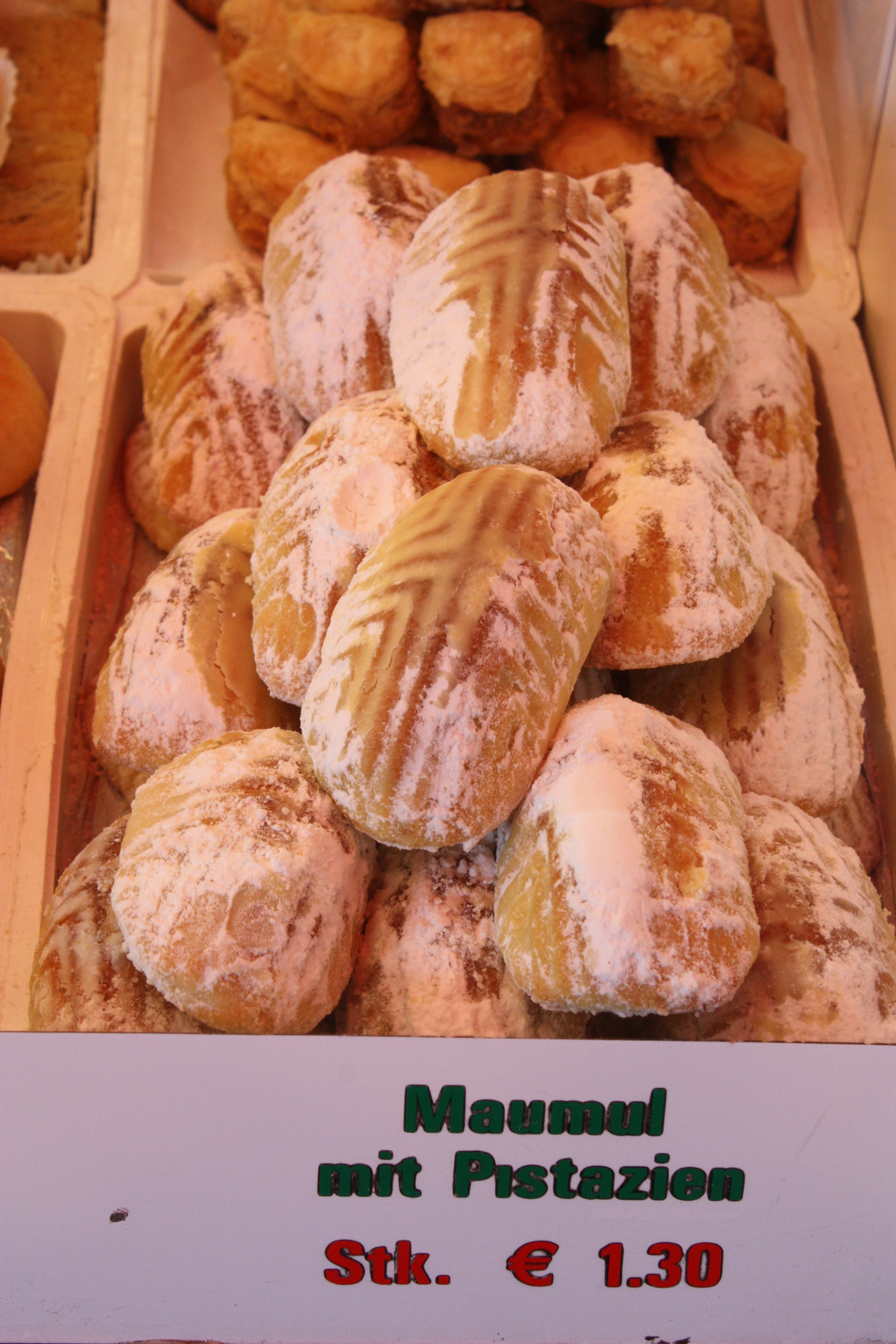 Naschmarkt, Vienna, Wien